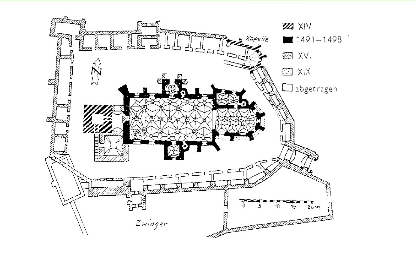 Biserica fortificata din Mosna